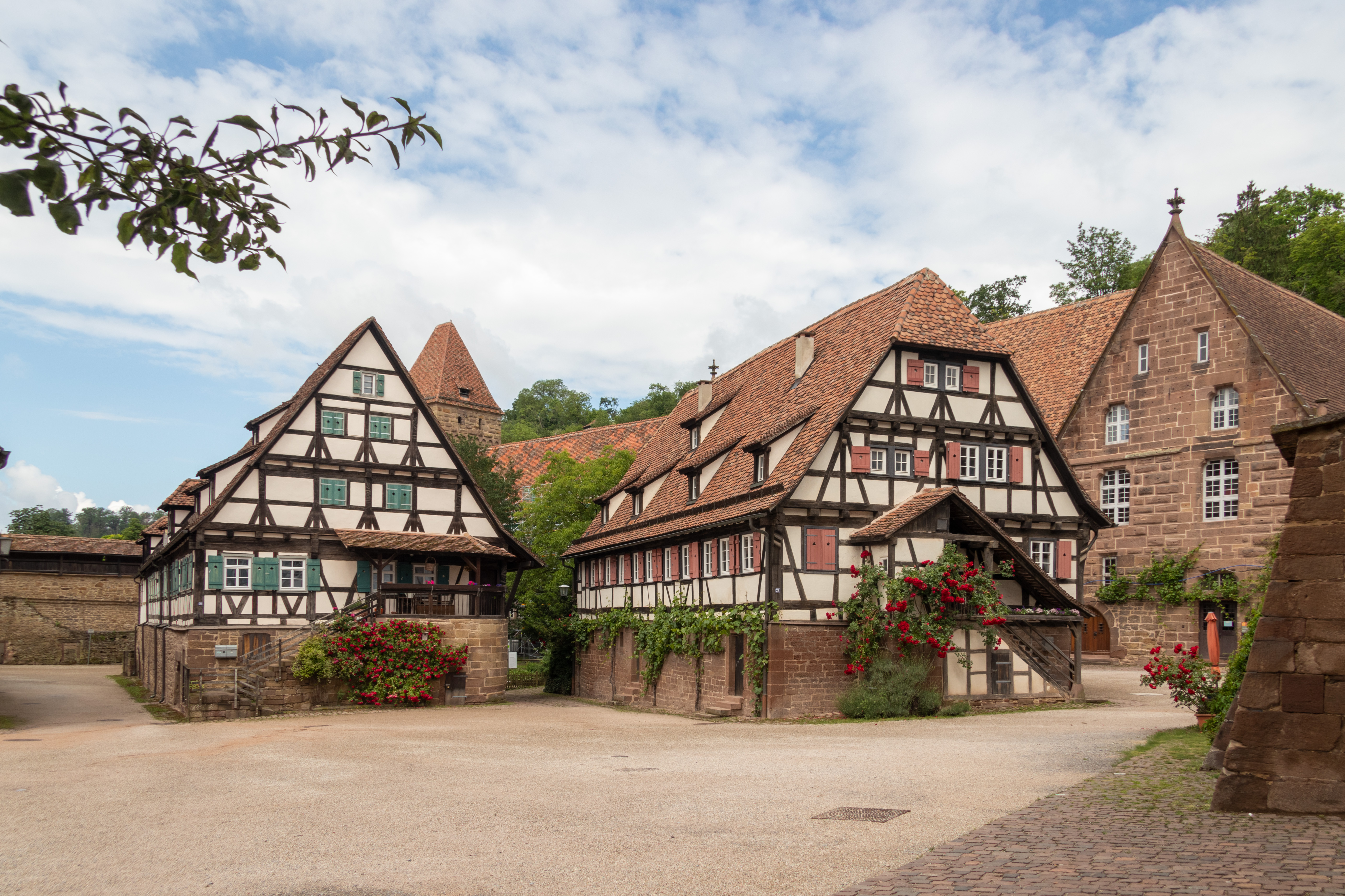 Haberkasten, Klosterbäckerei und Klostermühle im Kloster Maulbronn (v.l.n.r.).